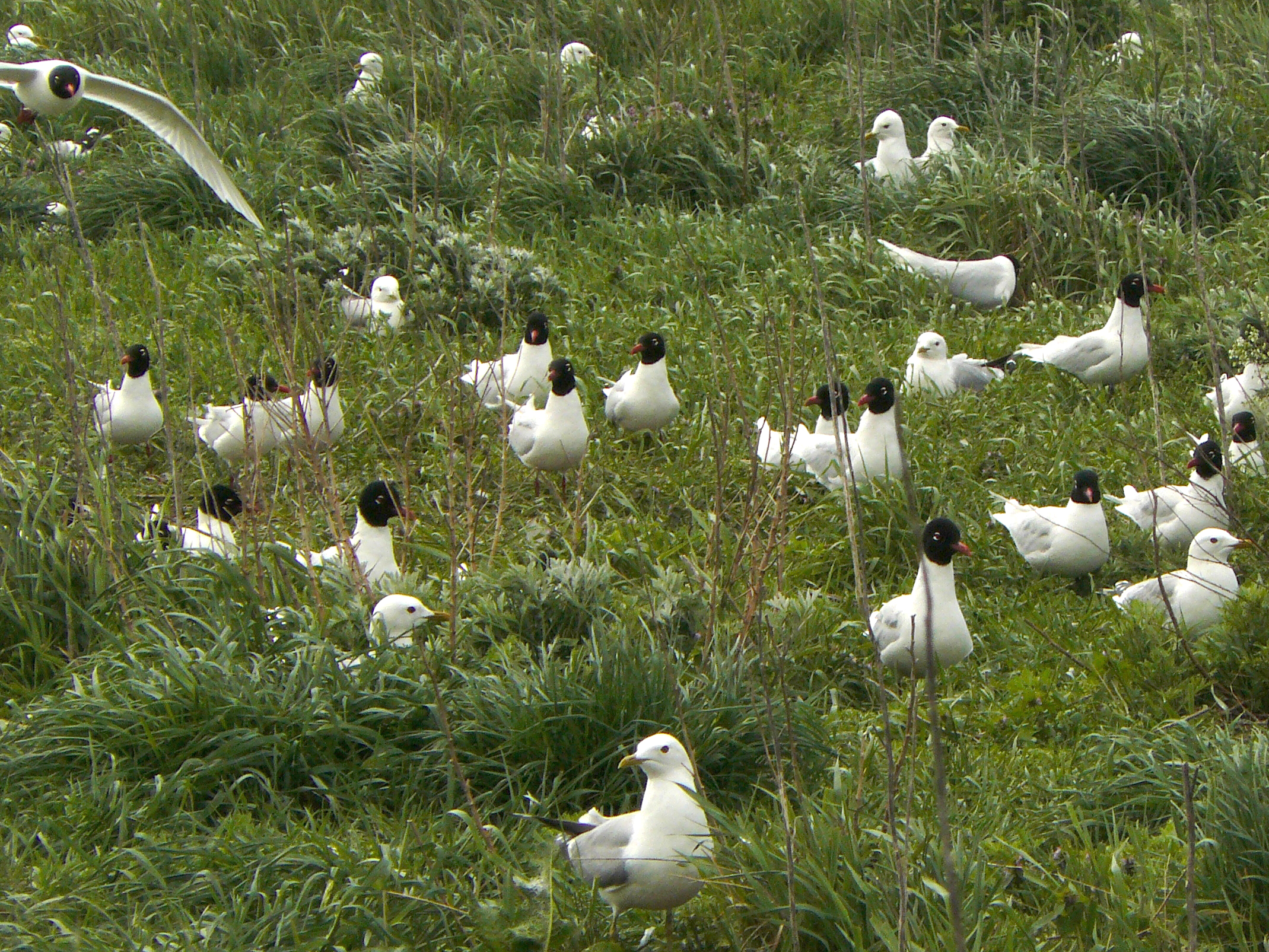 Gemeinsame Brutkolonie von Schwarzkopfmöwen (Ichthyaetus melanocephalus) und Sturmmöwen (Larus canus).